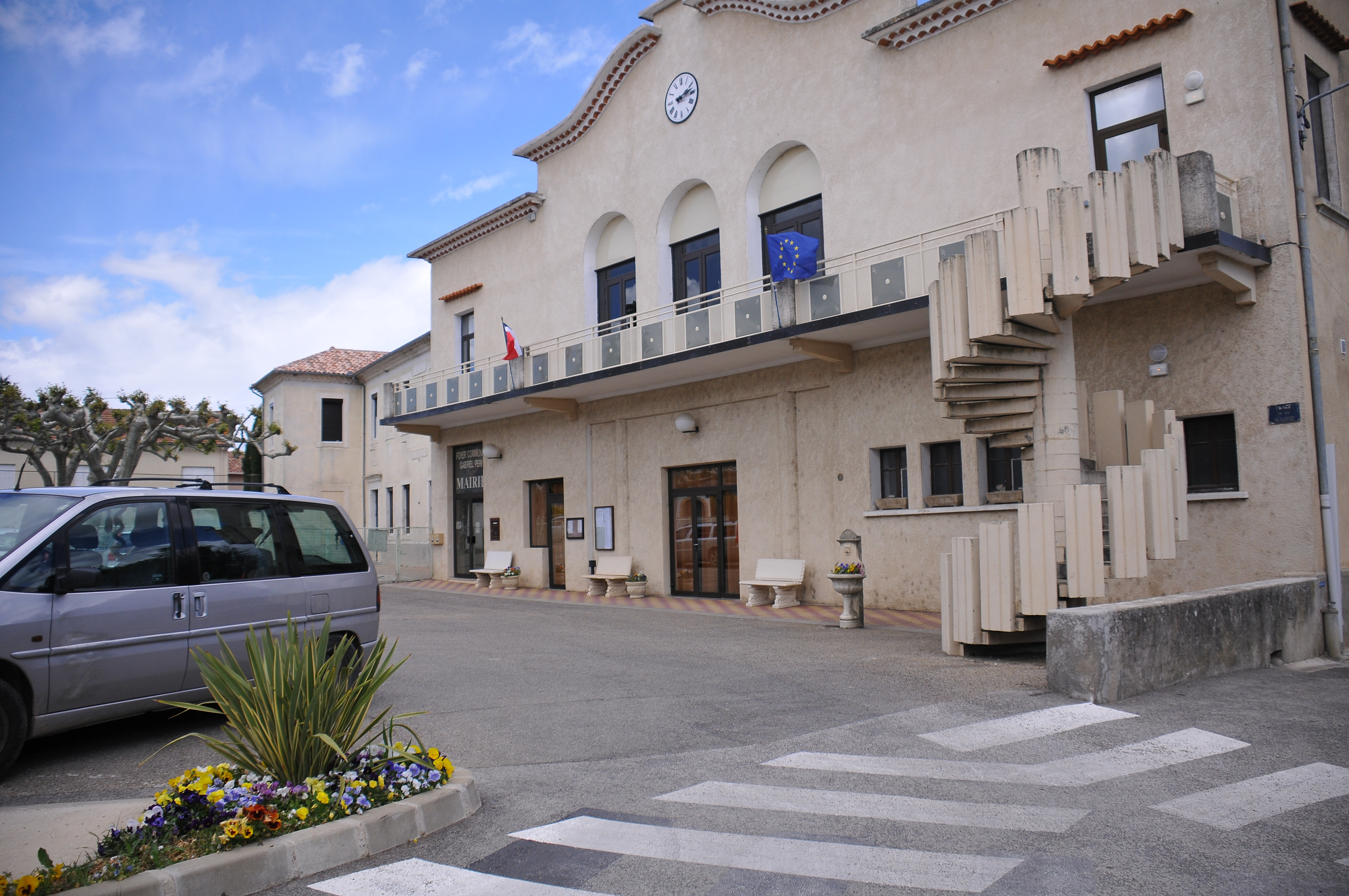 Place de la mairie